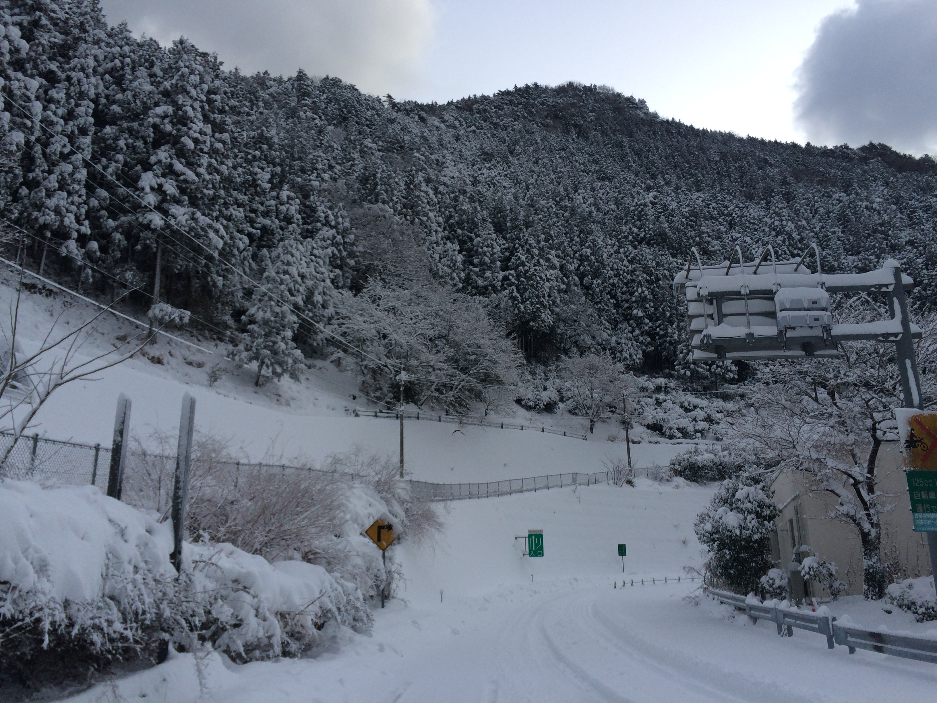 愛媛県四国中央市にある旧新宮村の高速道路料金所登り口です。撮影者は投稿者本人ですが、この景色は愛媛県四国中央市とネクスコ西日本の所有地でもあります。情報提供のため撮影しました。